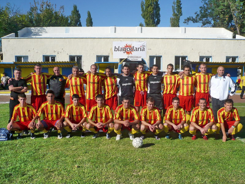 Футболният отбор на град Попово - "Черноломец 04" през есента на 2009 г.